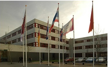 Locatie Stenden Hogeschool